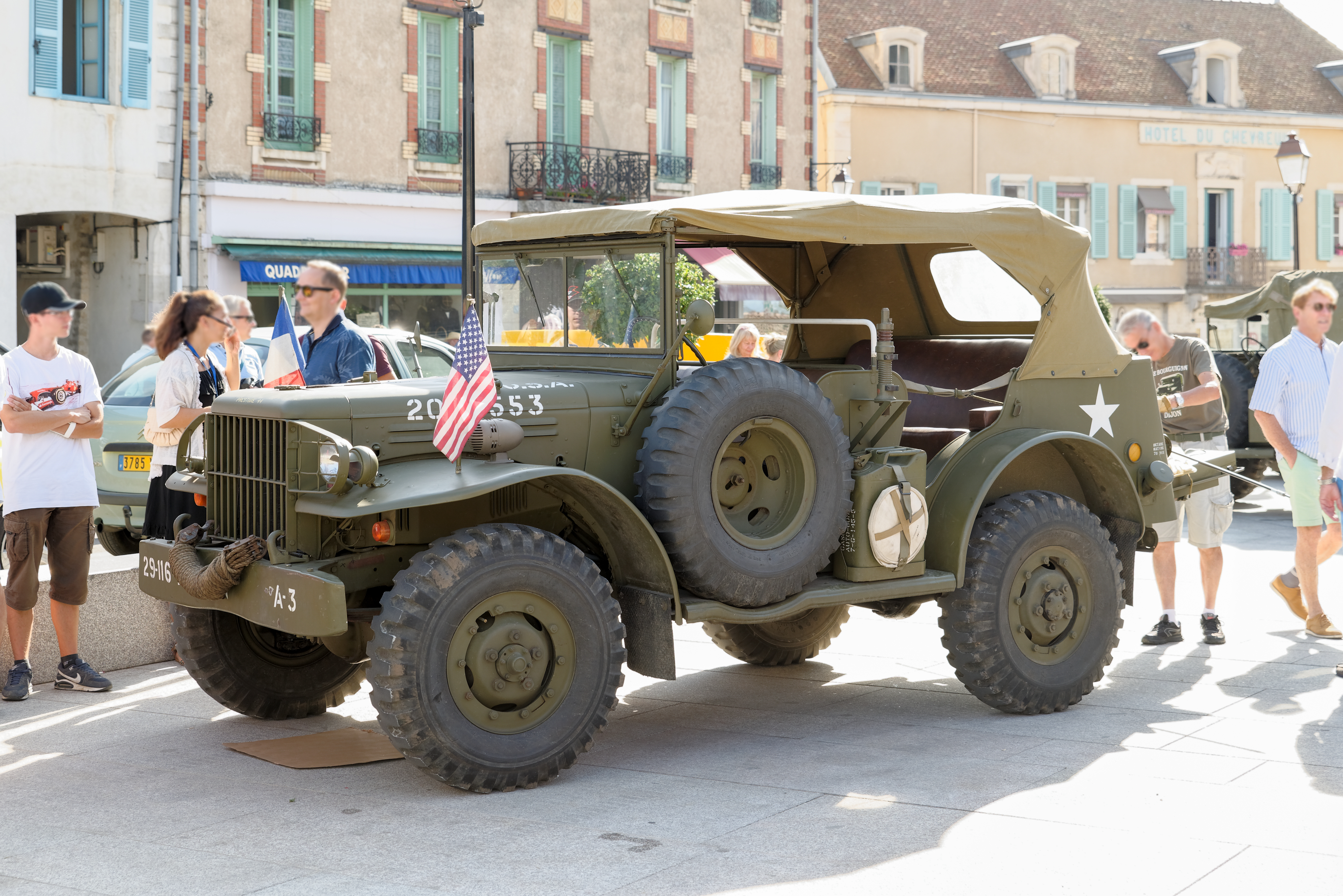 Exposition de véhicules militaires du Musée Bourguignon pour la Préservation des Véhicules Militaires, place de l'église lors du 50ème anniversaire du film La Grande Vadrouille à Meursault (Côte-d'Or, Bourgogne-Franche-Comté, France).